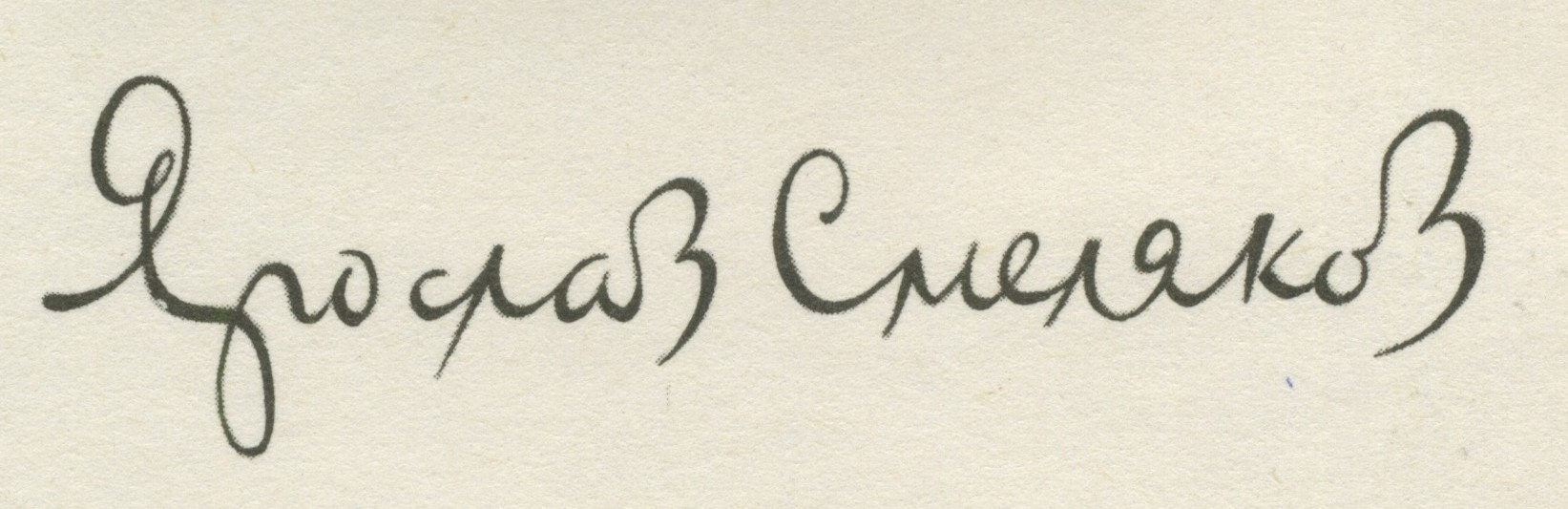 Автограф поэта Ярослава Смелякова